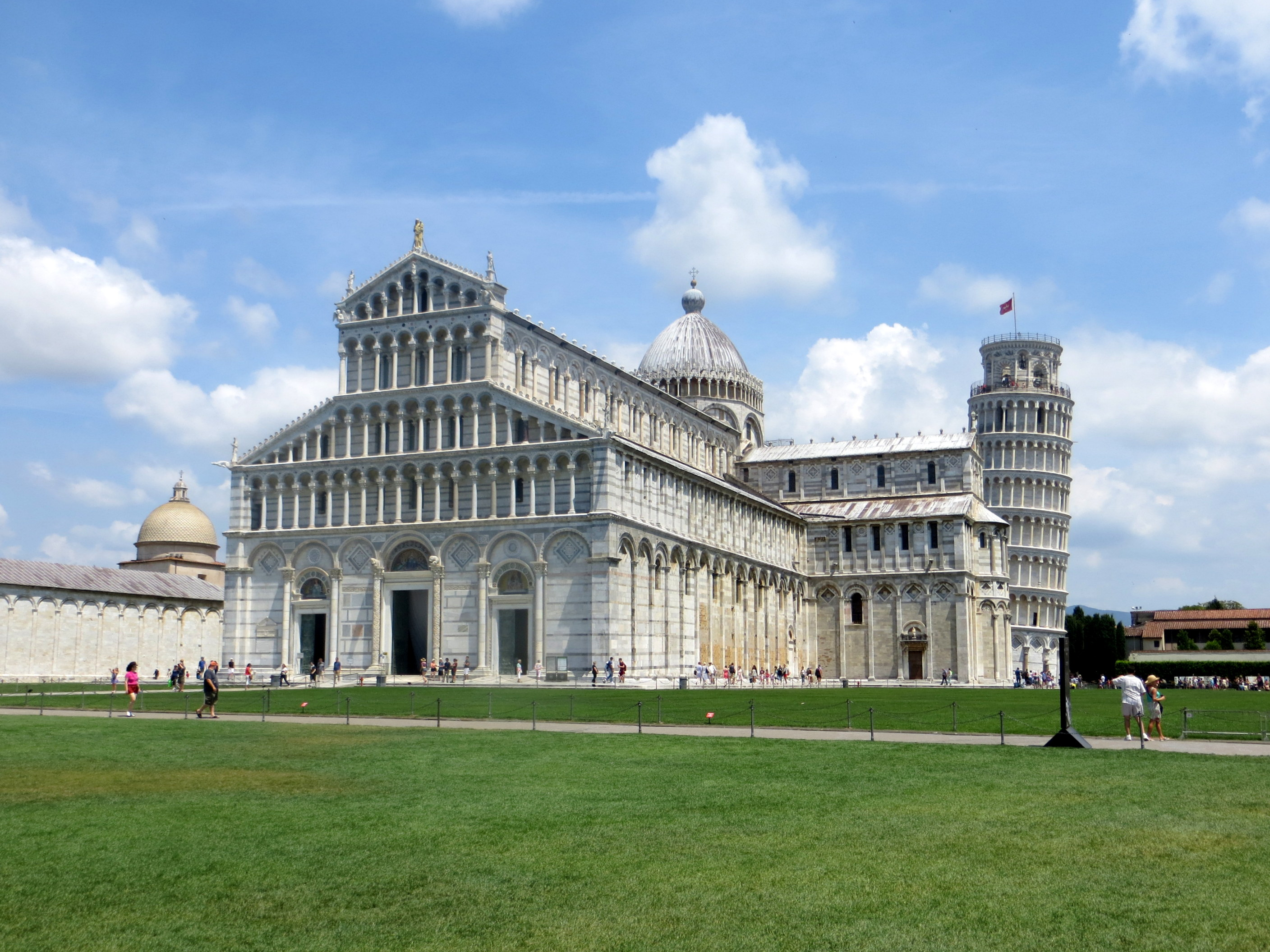 Duomo di Pisa